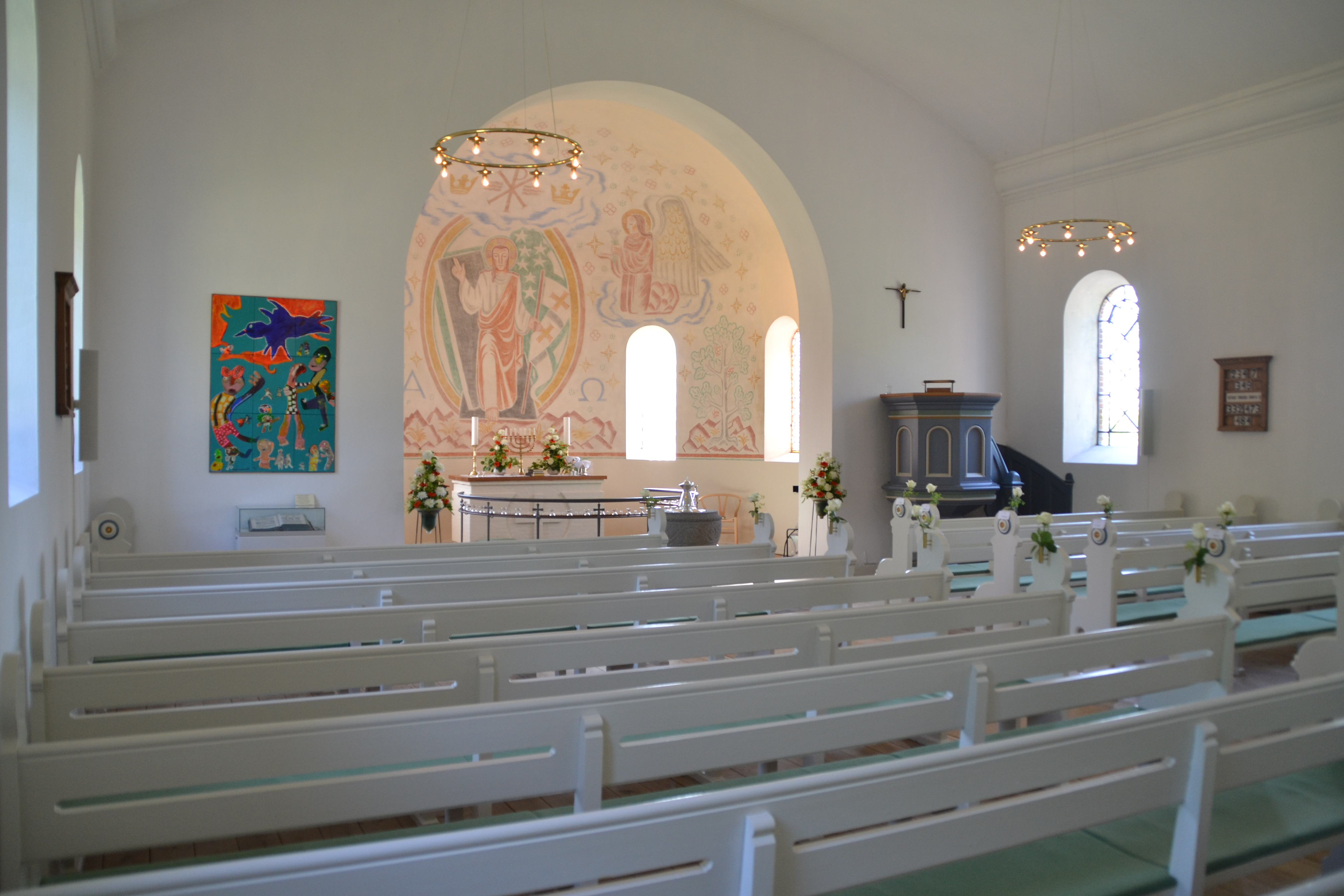 Ågård Frimenighedskirke indvendig med alterparti af Harald Borre fra 1953